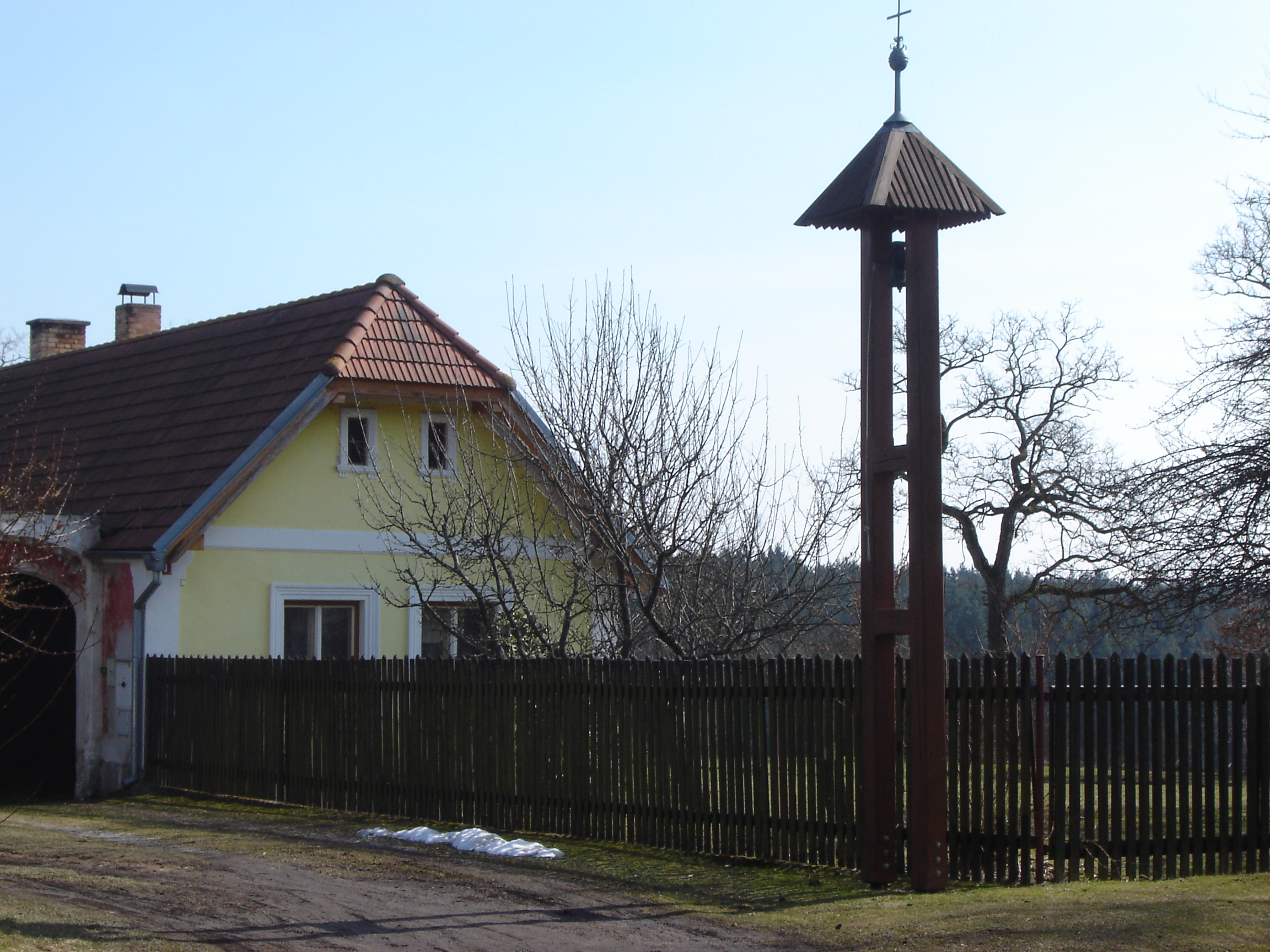 zvonička